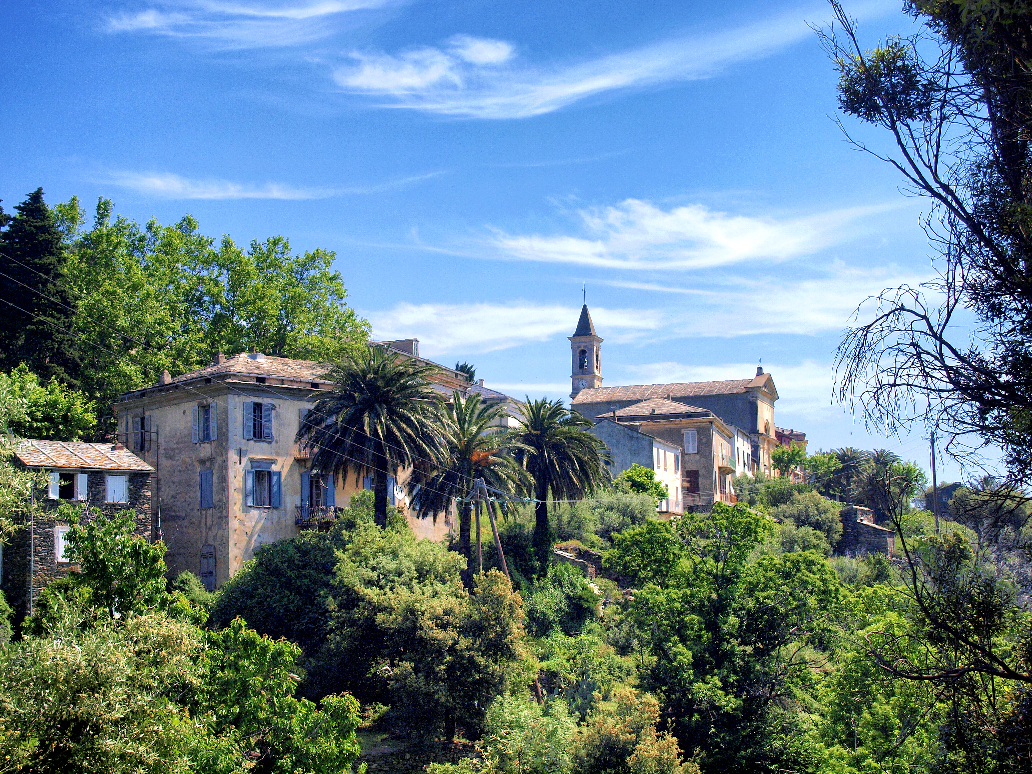 Santa-Maria-di-Lota, Cap Corse (Corse) - Village de Figarella avec le clocher de l'église Sant' Antone